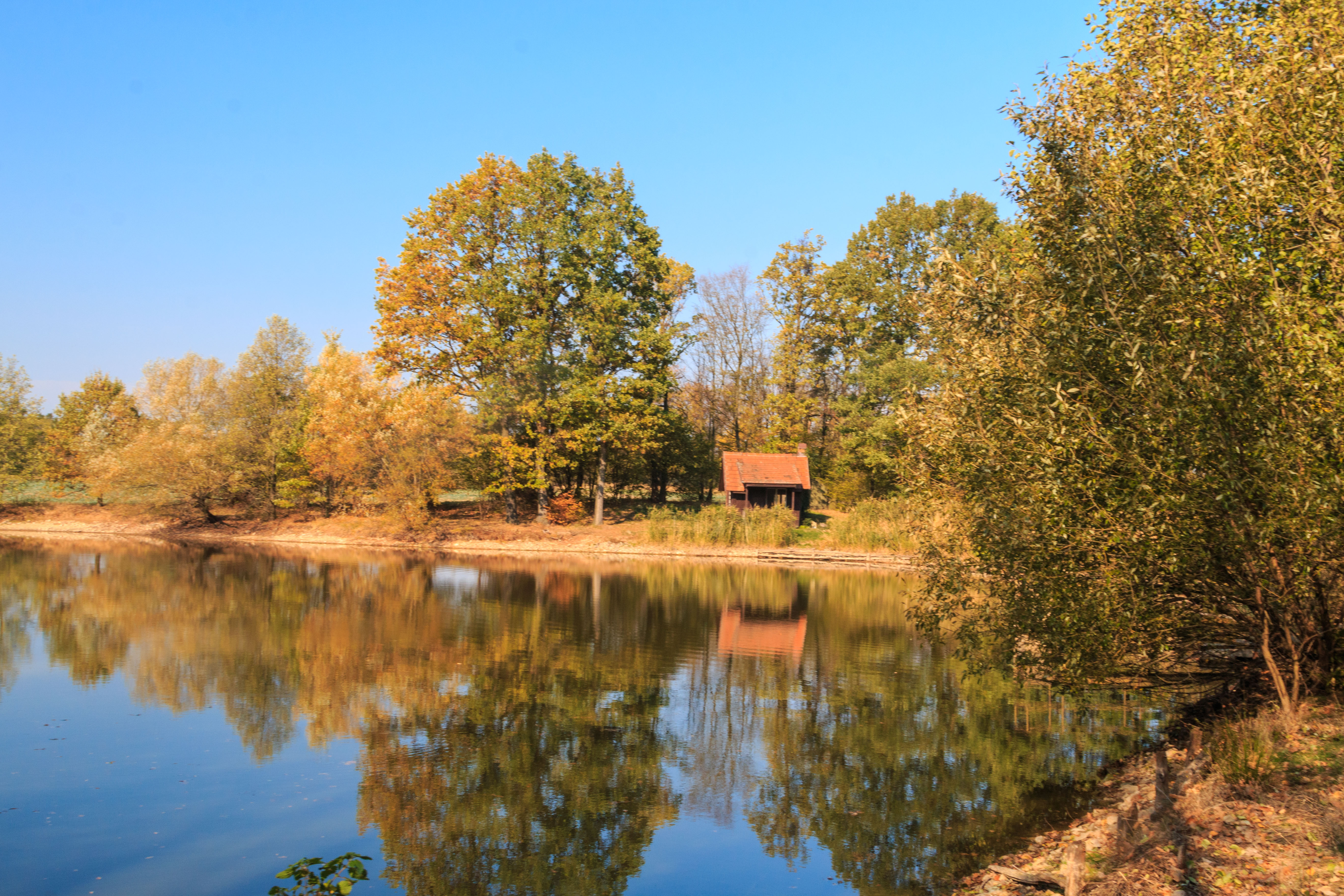 Rybník Smetánka u Šiškovic Project: Vodstvo. Ticket: 1618.